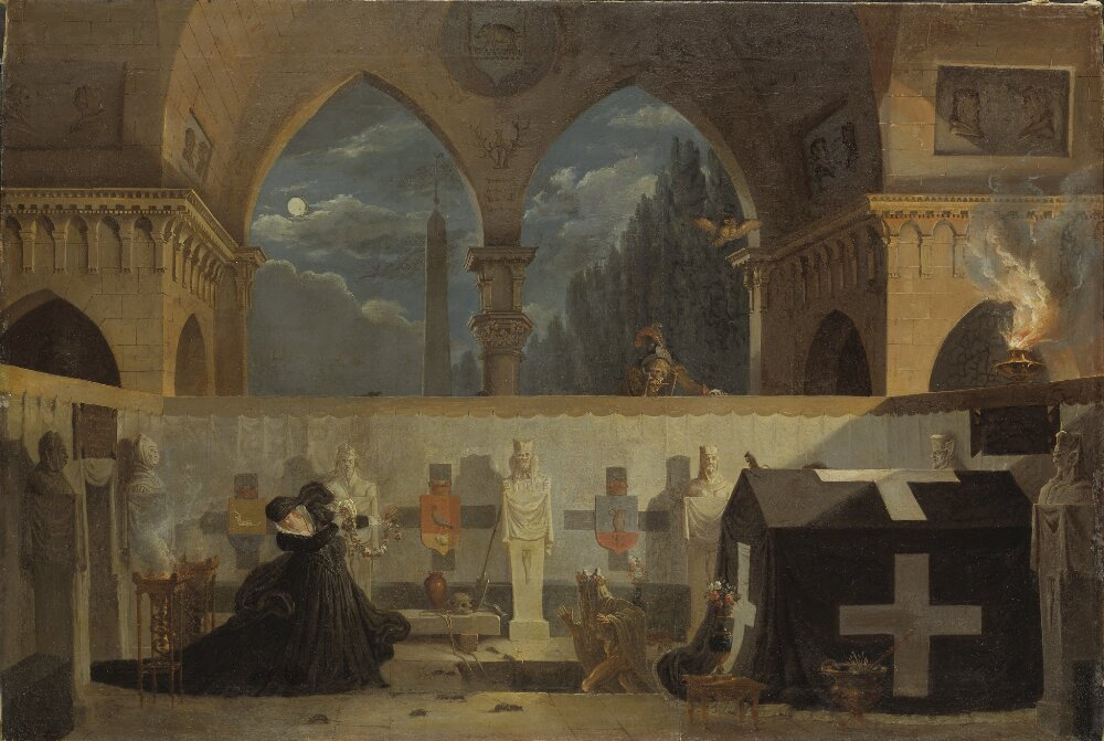 Scen från "Fale Bure", akt IV. Skådespel av J G de la Gardie 1795. Målning från 1795 av Louis Jean Desprez.